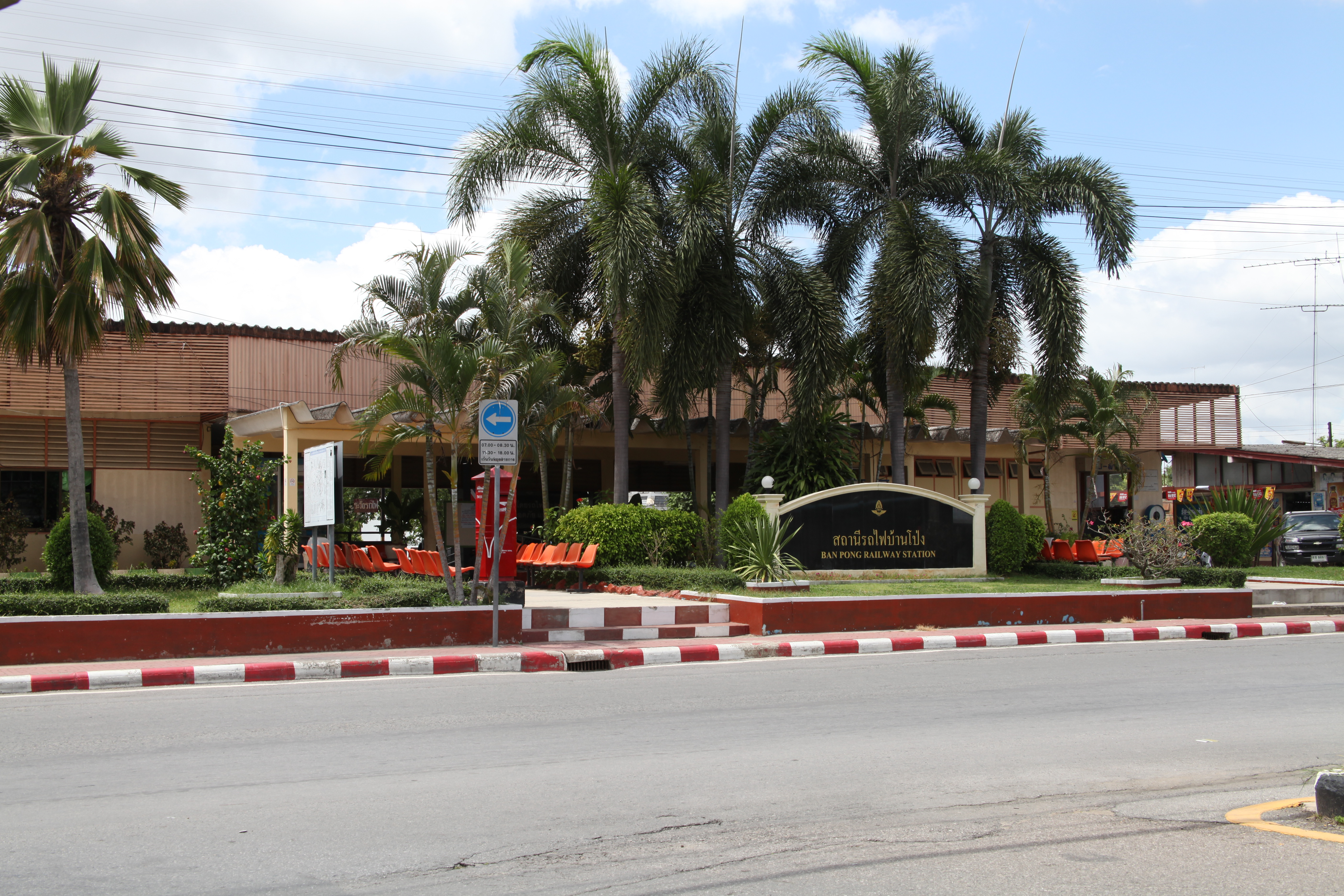 バーンポーン駅